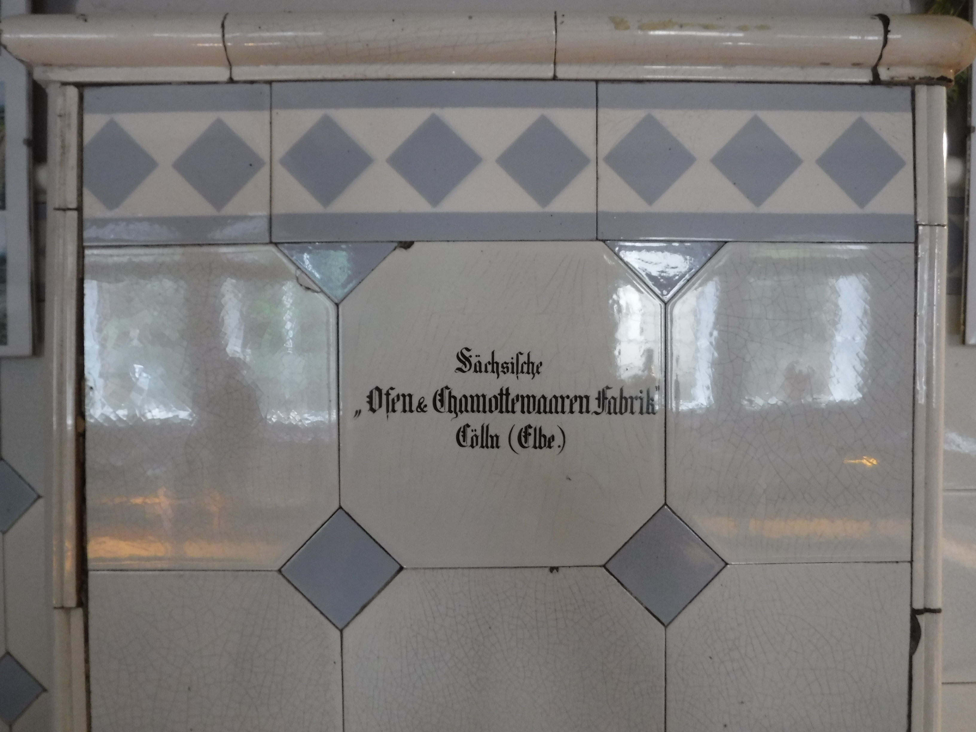 Historische Kacheln im Weingut Henke im Alten Wasserwerk in der Elbgaustraße 45, 01640 Coswig (Sörnewitz) zum Tag des offenen Weinguts 2017 Sächsische "Ofen & Chamottewaaren Fabrik" Cölln (Elbe.)